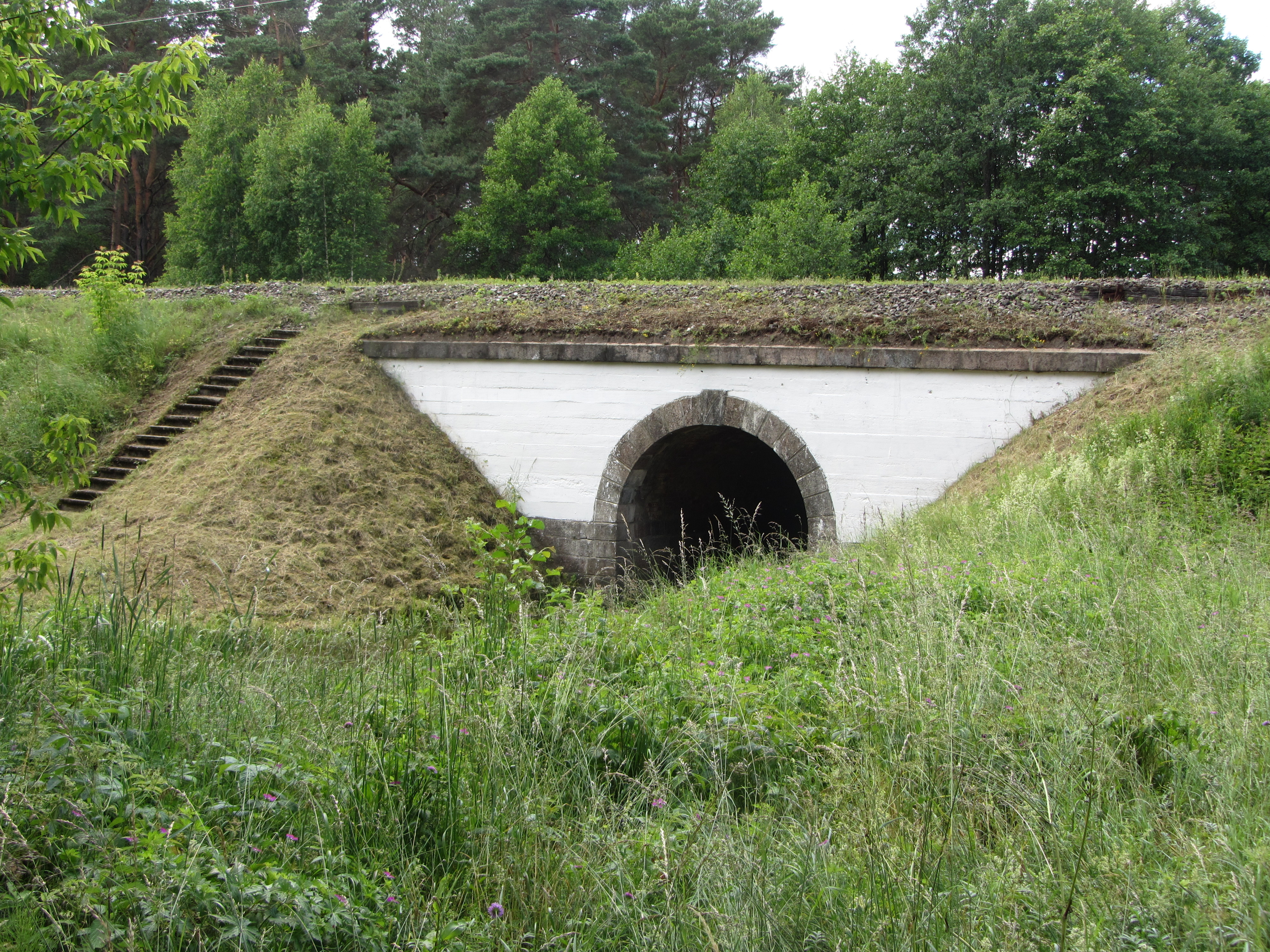 Sarių sen., Lithuania